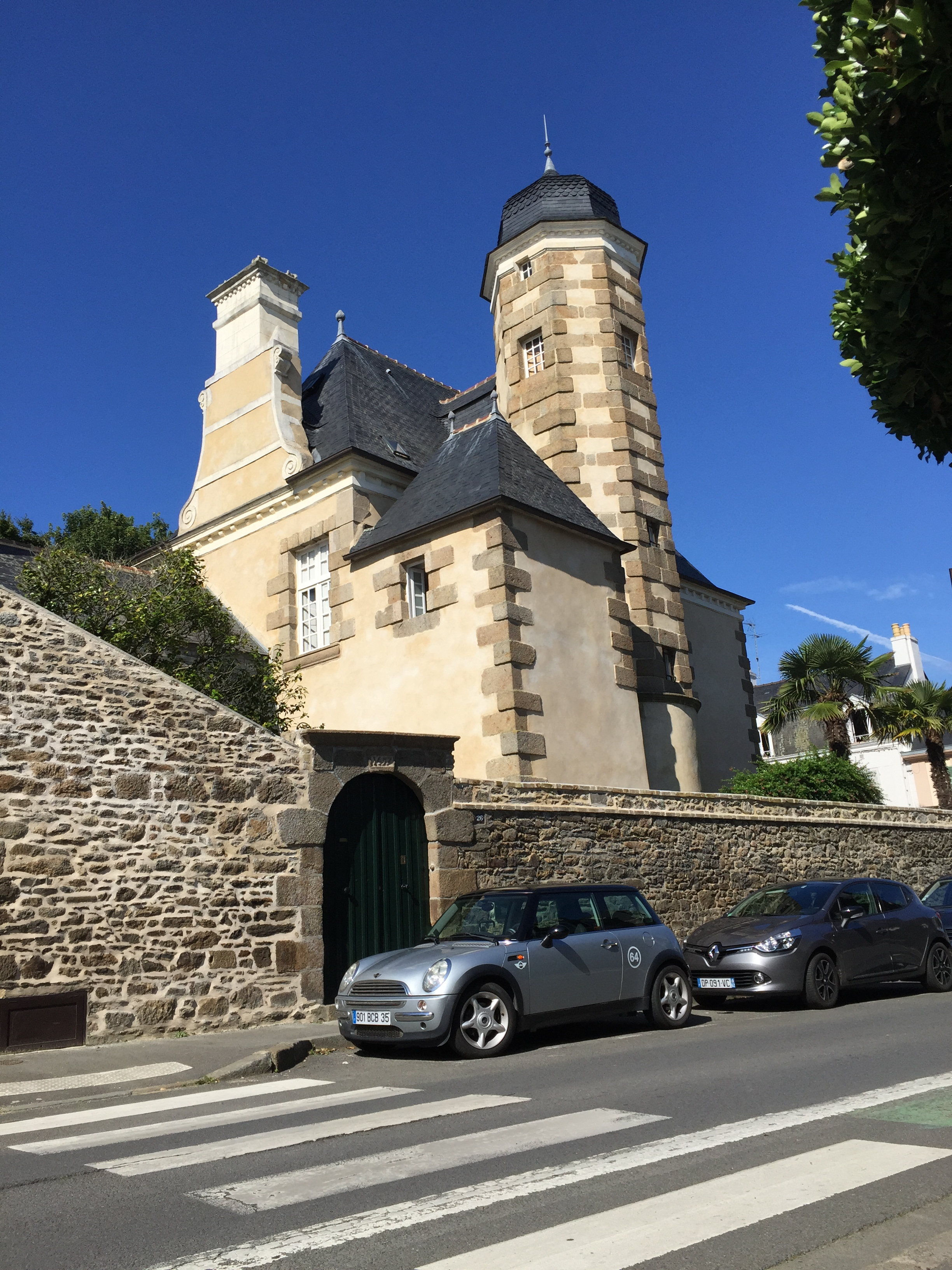 Photographie de la Verderie, vue de la rue, à Saint-Servan